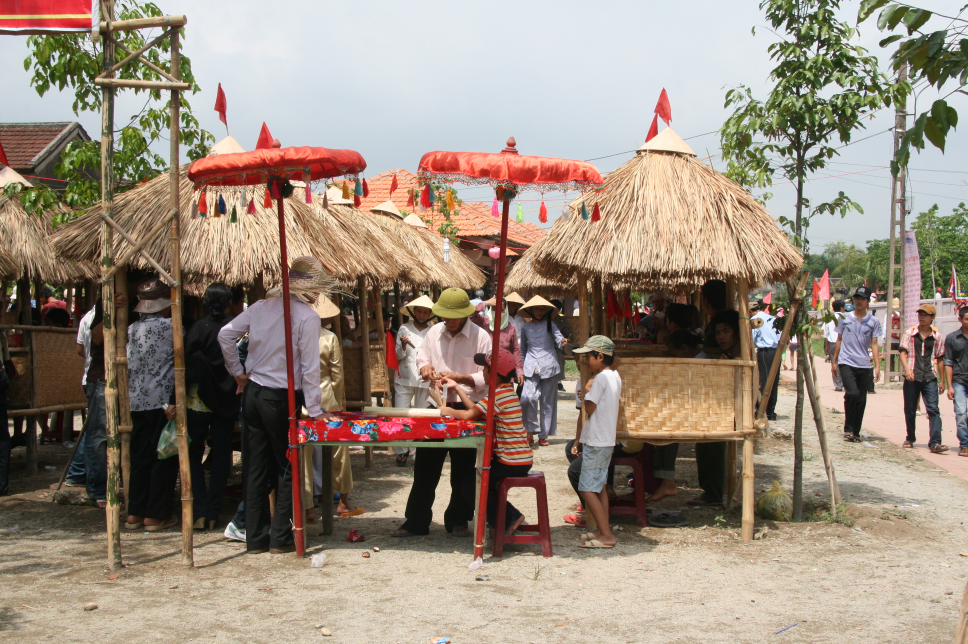 Chòi bài